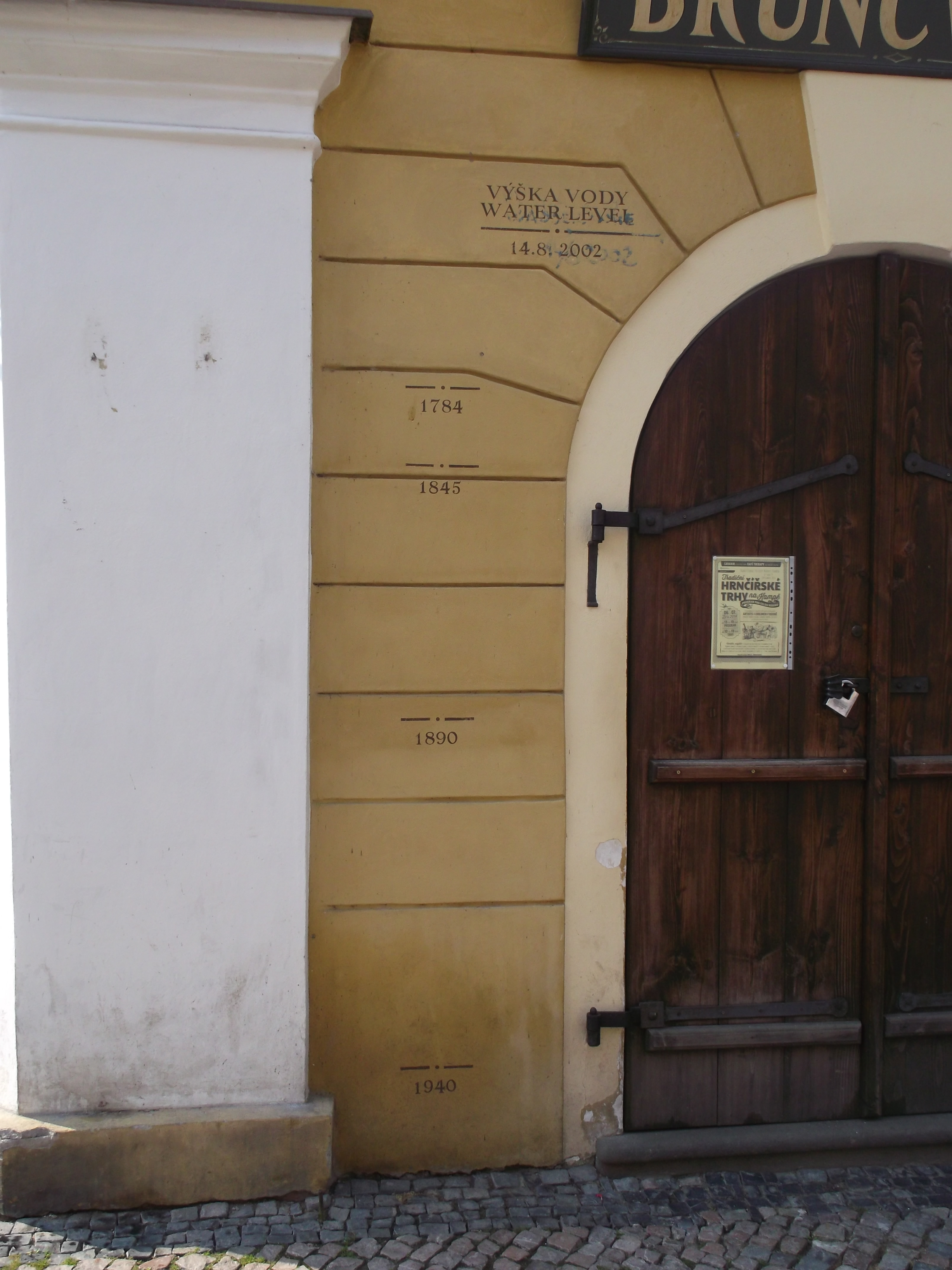 Dům U zlatého lva, Praha 1-Malá Strana, Na Kampě 493/7, Hroznová 493/5, Malá Strana - povodňové značky 1784-2002.